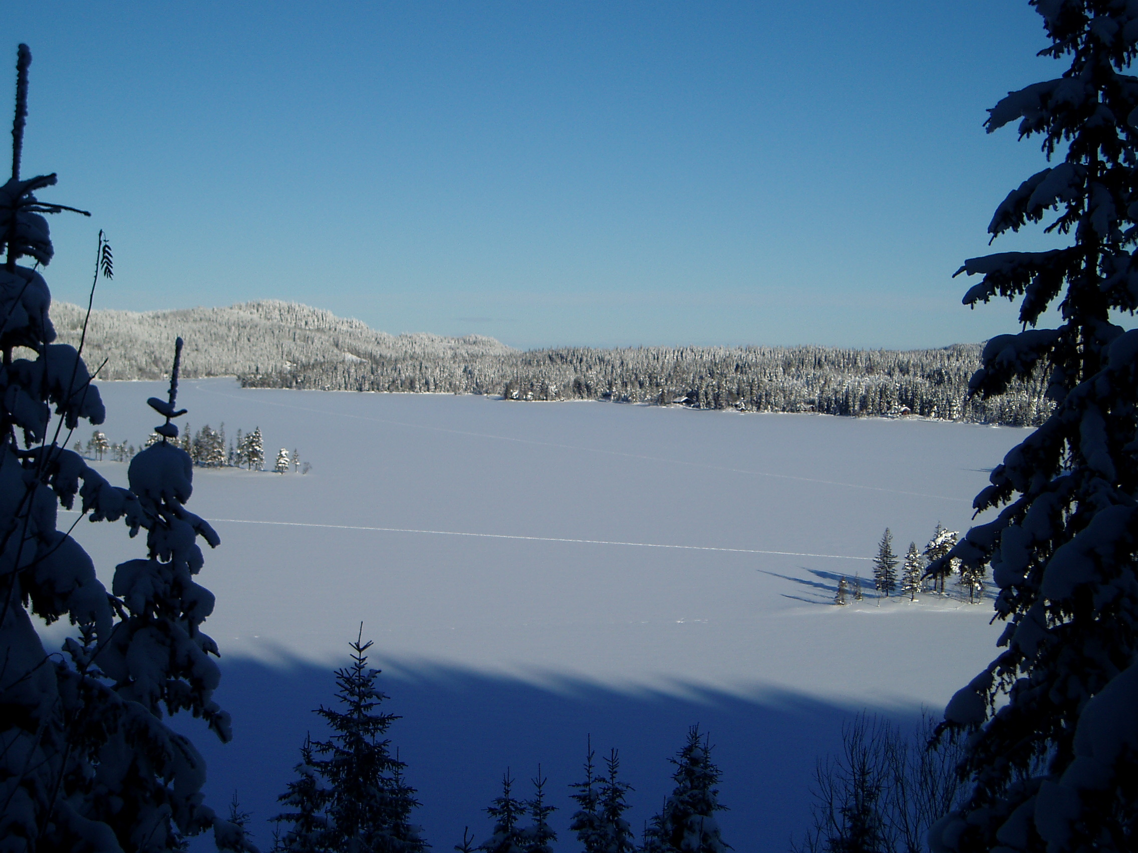 Øyangen, innsjø på Ringkollen i Ringerike.